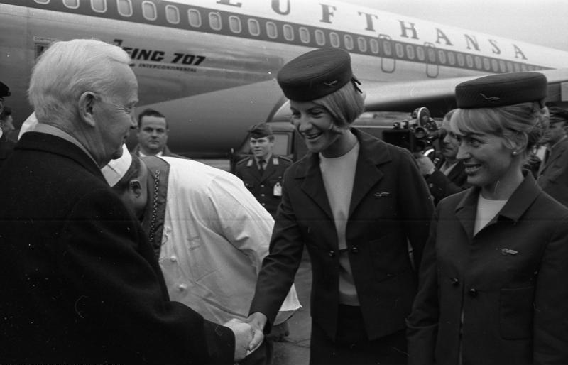 Abflug des Bundespräsidenten zum Staatsbesuch nach Mexiko, Flughafen Köln/Wahn